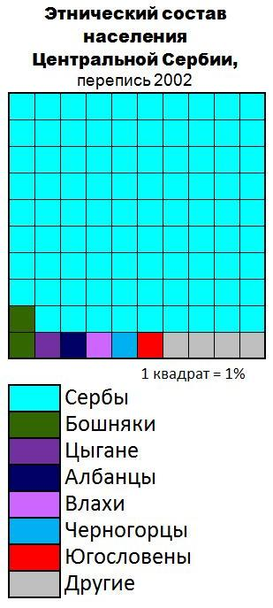 Этнический состав населения Центральной Сербии (2002)